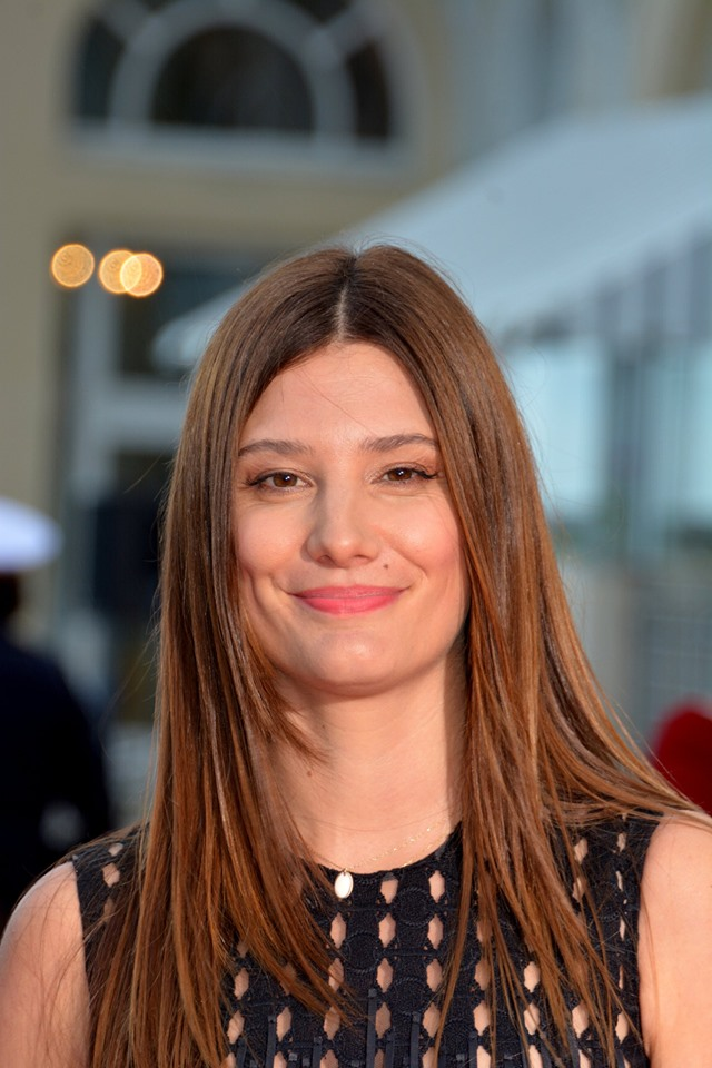 Alice Pol Cabourg 2019